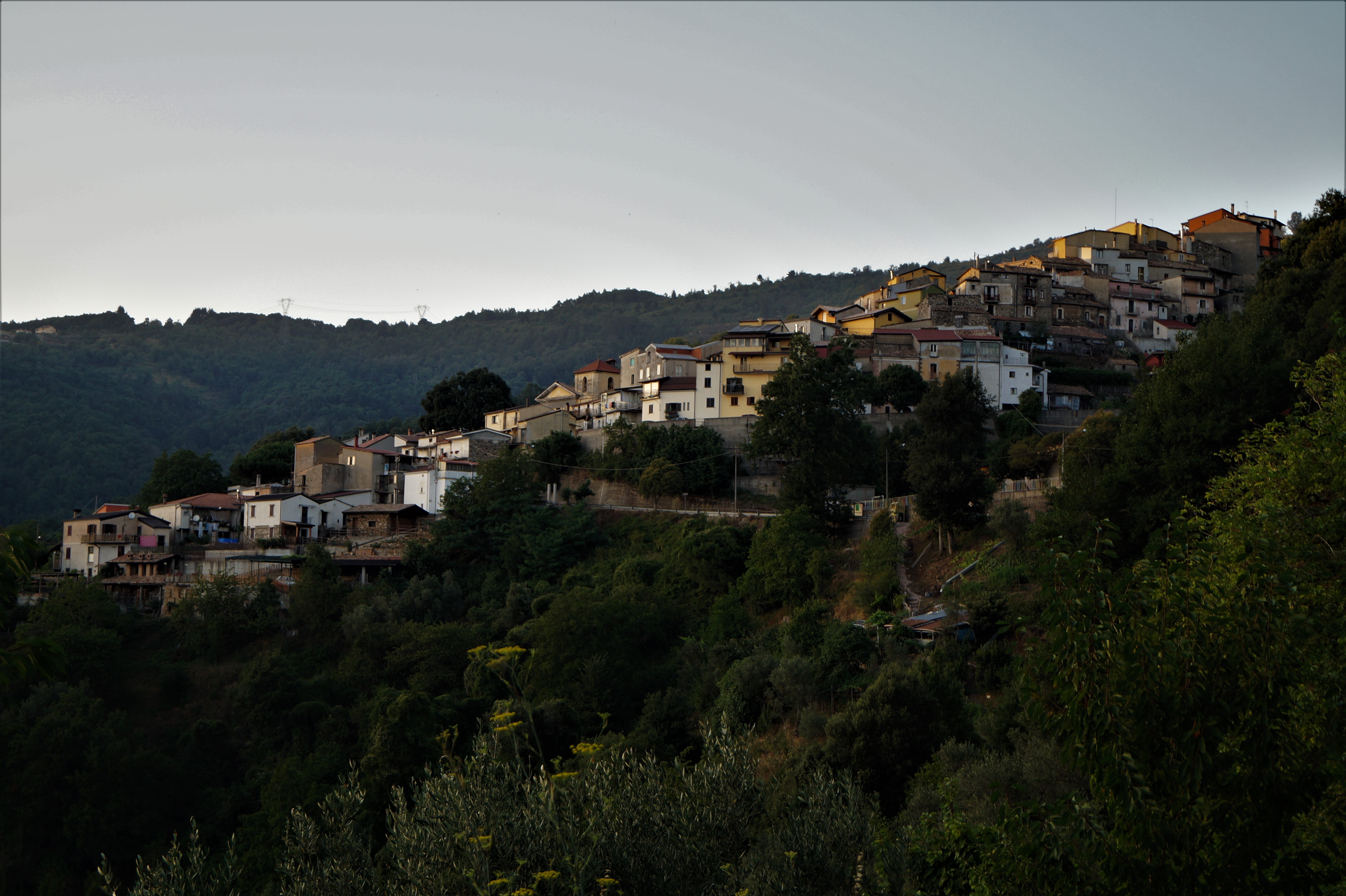 Angoli Cz